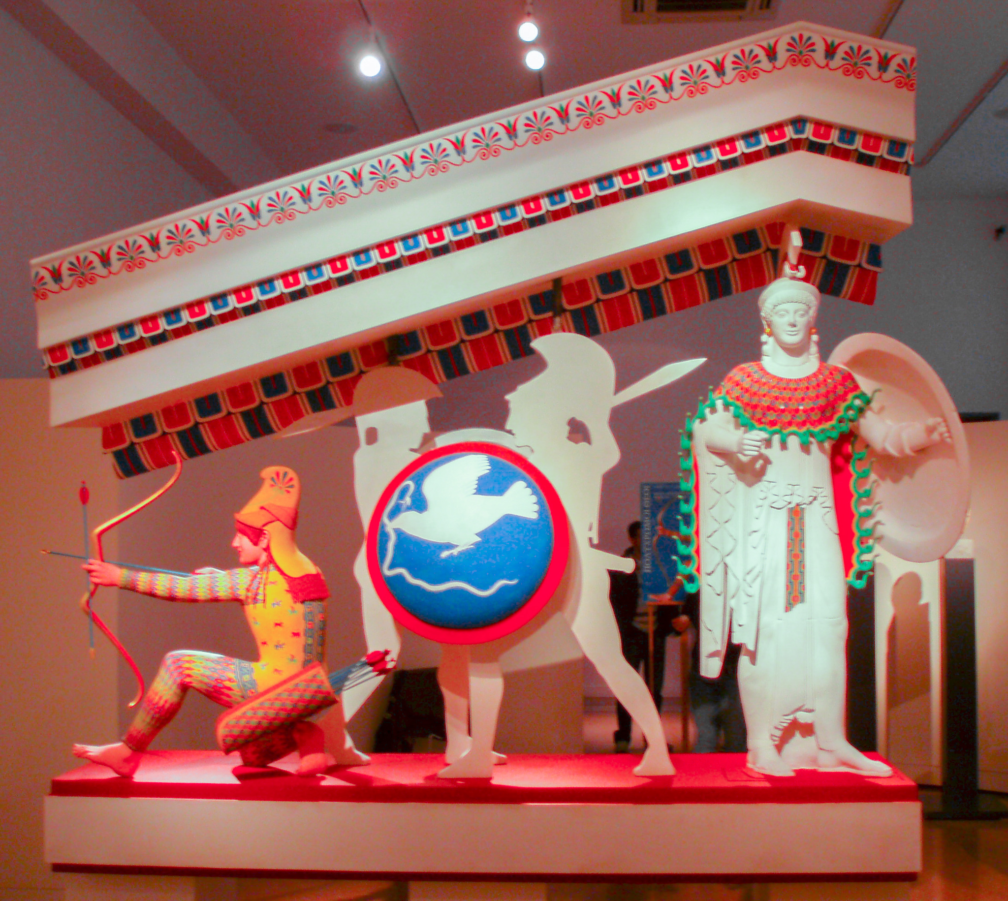 Restitution du décor polychrome de statues du fronton Ouest du temple d'Athéna Aphaia à Égine. Vers 490 av. J.-C. Exposition « Bunte Götter » dans la version montrée à Athènes. Etude : Vinzenze Brinkmann et Hermann Pflug. Peinture : Ulrike Koch-Brinkmann. Original : Munich, Staatliche Antikensammlungen und Glyptothek.